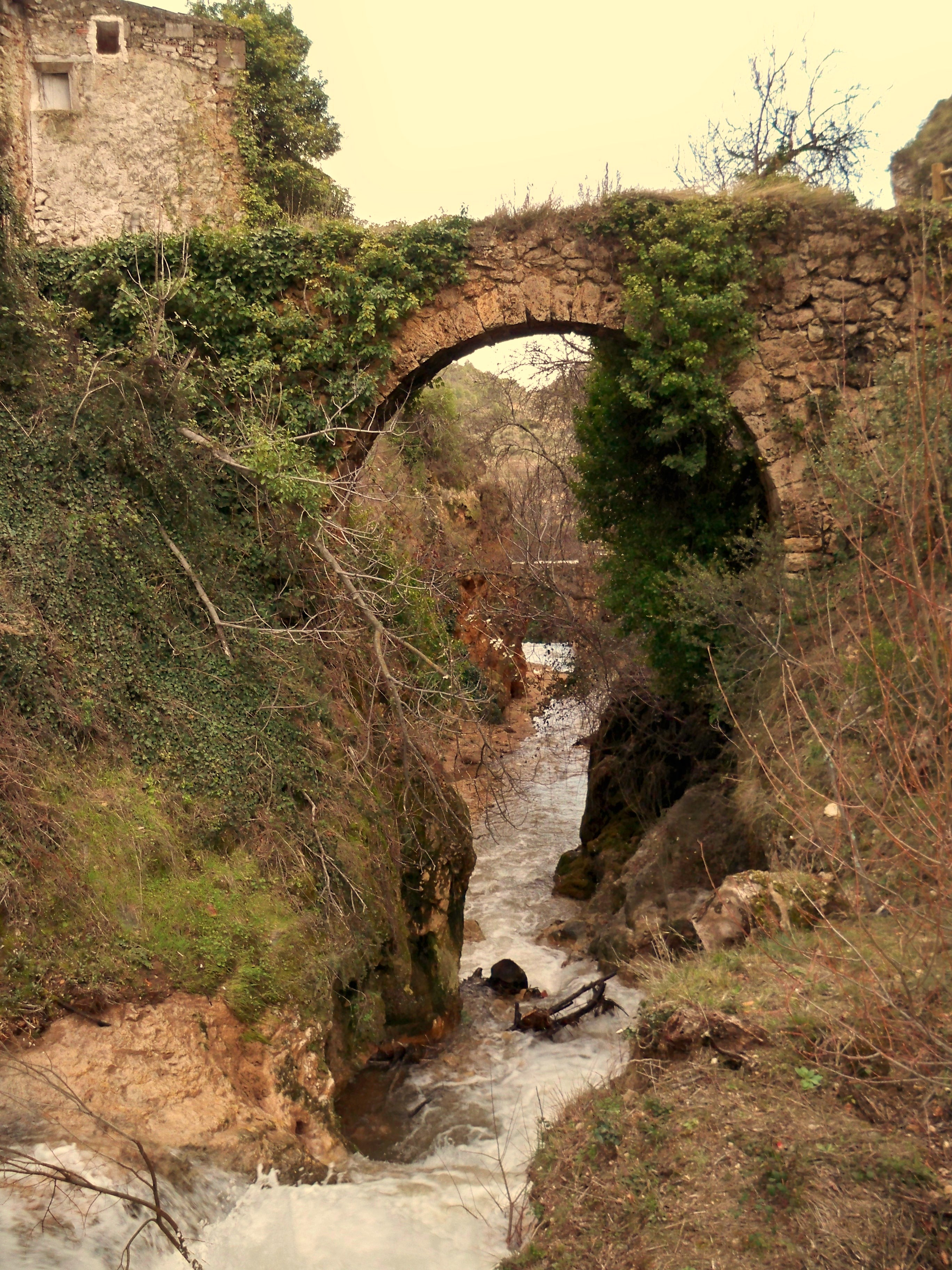 Fotografía del acueducto de Molinicos (Albacete), al final de la calle Molinos. De origen medieval, era empleado por diversos molinos harineros de la zona para molturar.